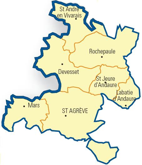 Carte détaillée des communes du canton (Ardèche)